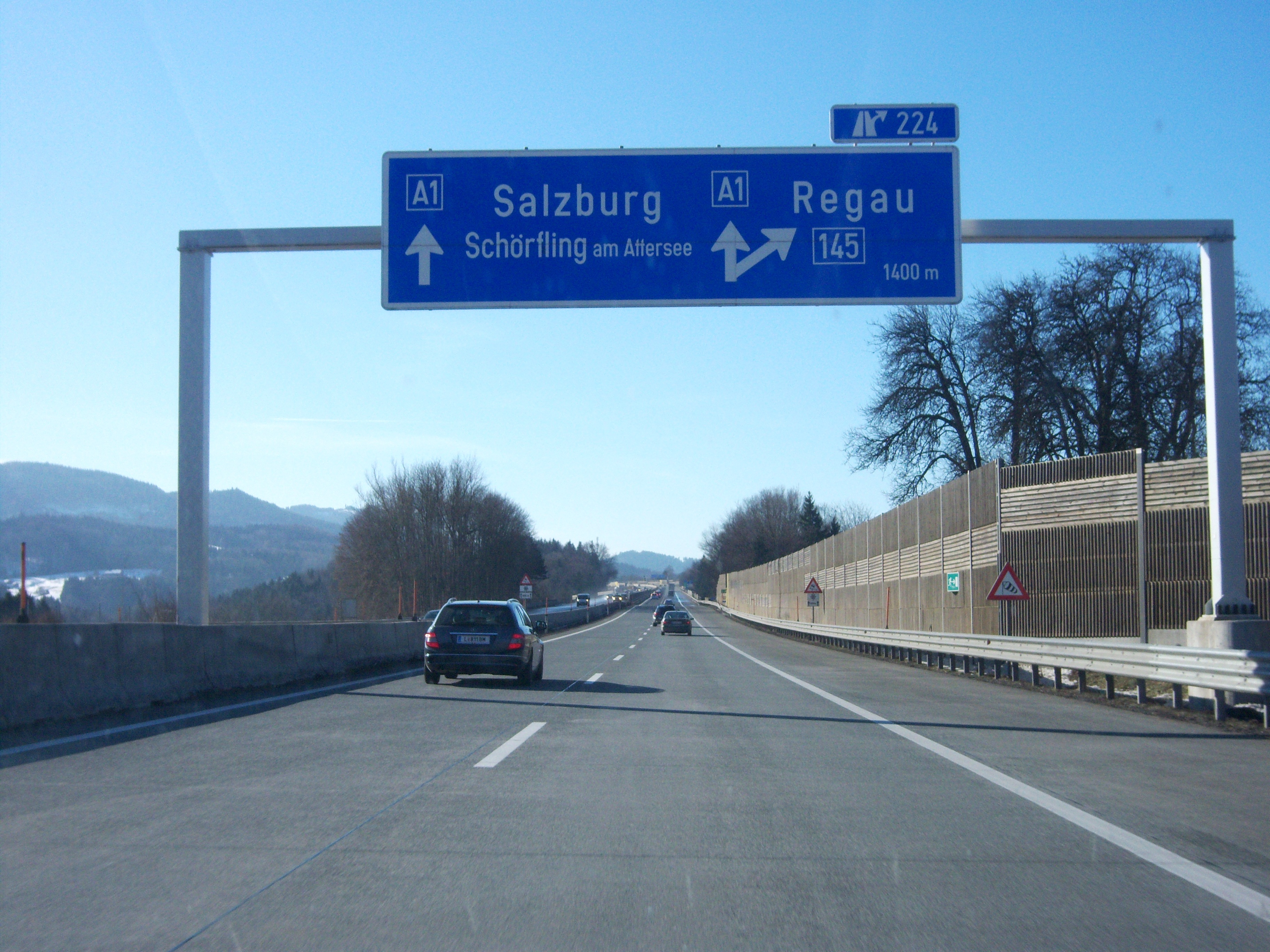 West Autobahn A1 Richtung Salzburg im Bereich der Anschlussstelle Regau